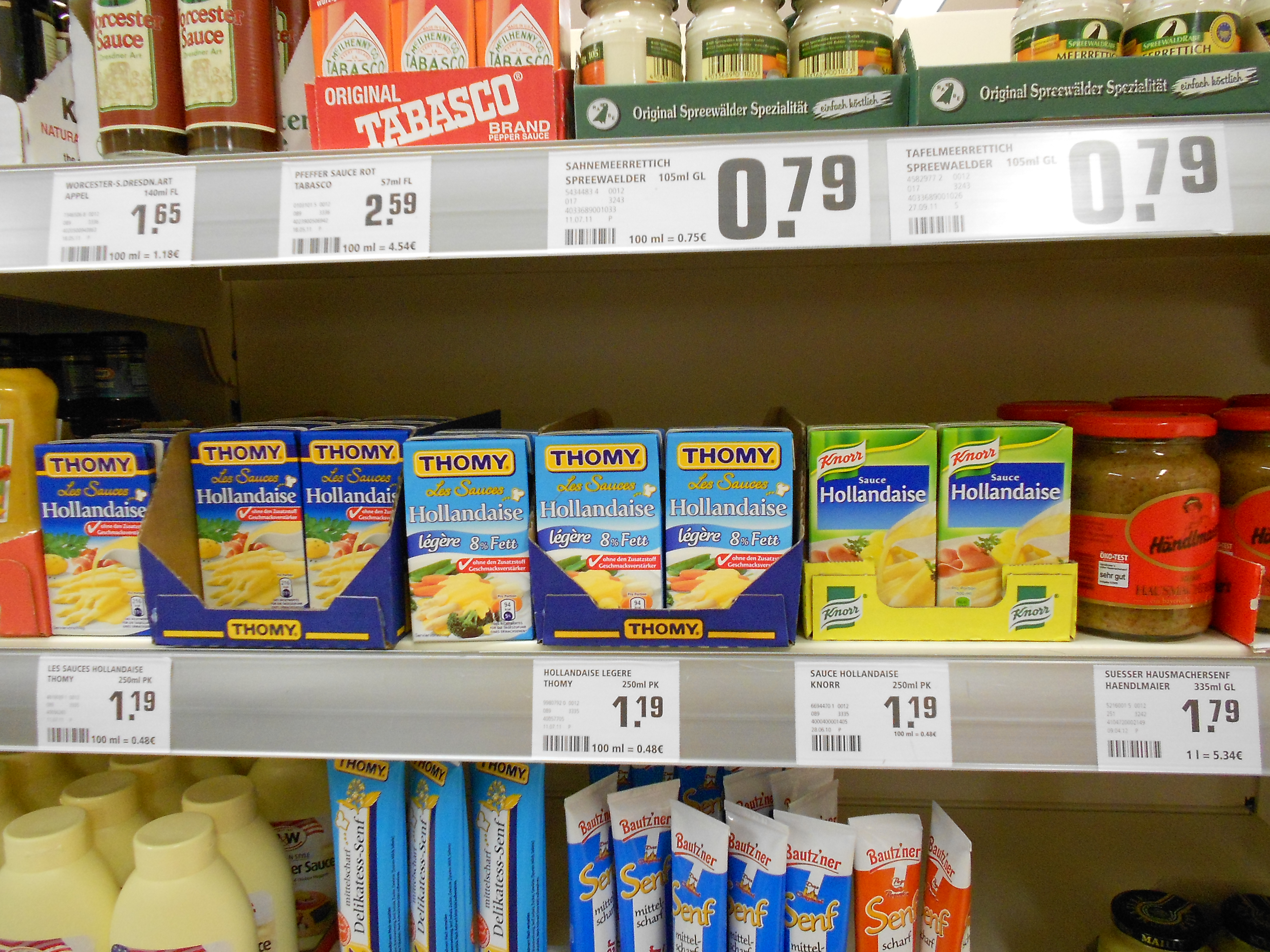 Saucen im Supermarkt